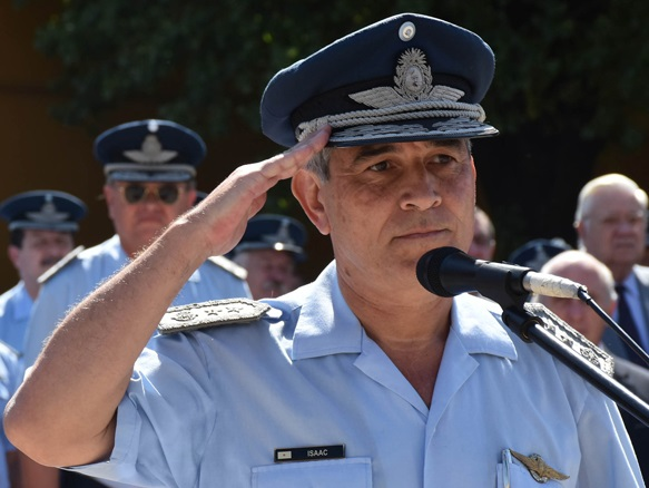 Brigadier Xavier Isaac jurando como Jefe el Estado Mayor de la Fuerza Aérea Argentina.